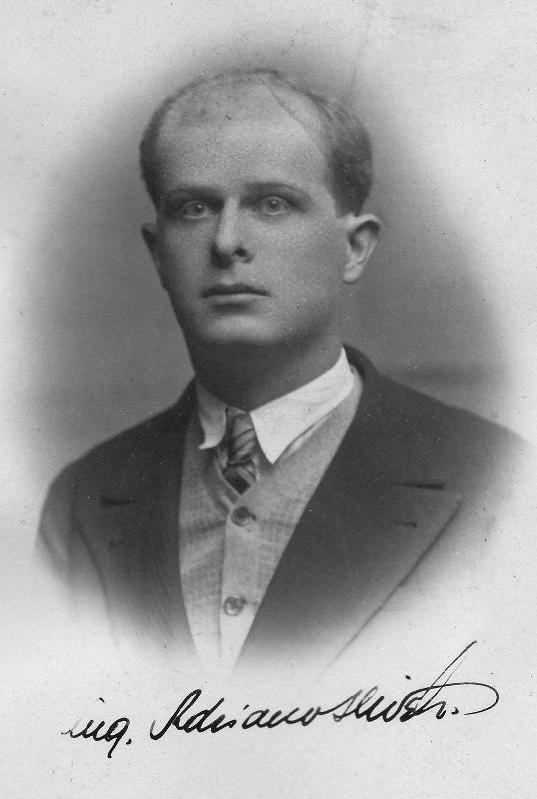 Fotografia a mezzo busto di Adriano Olivetti (1901-1960), con firma autografa del 1925, anno in cui il giovane industriale, dopo avere iniziato a lavorare nella ditta paterna, facendo anche esperienza del lavoro di fabbrica, parte per un lungo viaggio di studio negli Stati Uniti, dove avra' modo di visitare numerosi stabilimenti industriali, soffermandosi con particolare attenzione sugli aspetti tecnologici e organizzativi della produzione, 1925.